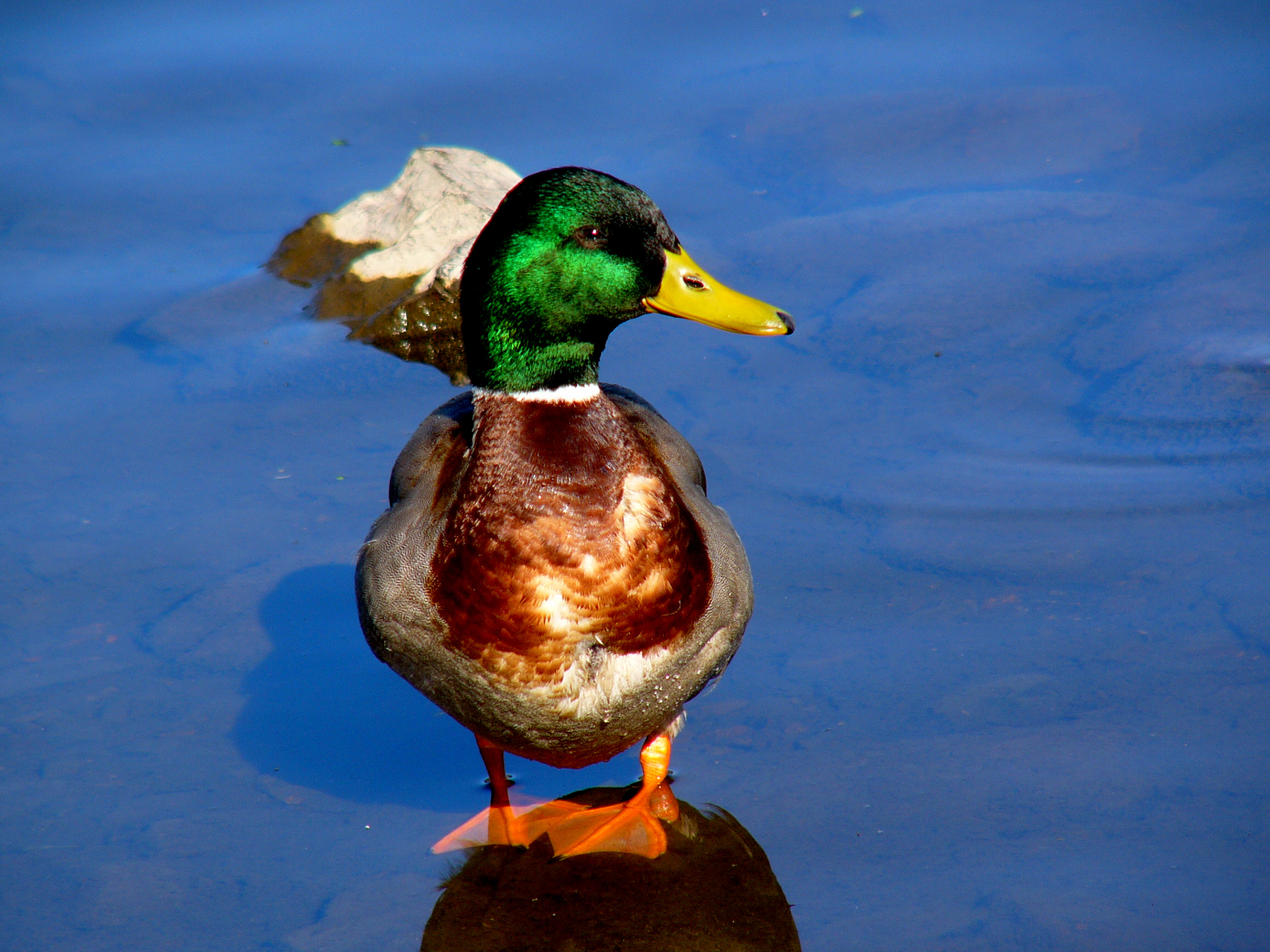 Mallard duck (Anas platyrhynchos)